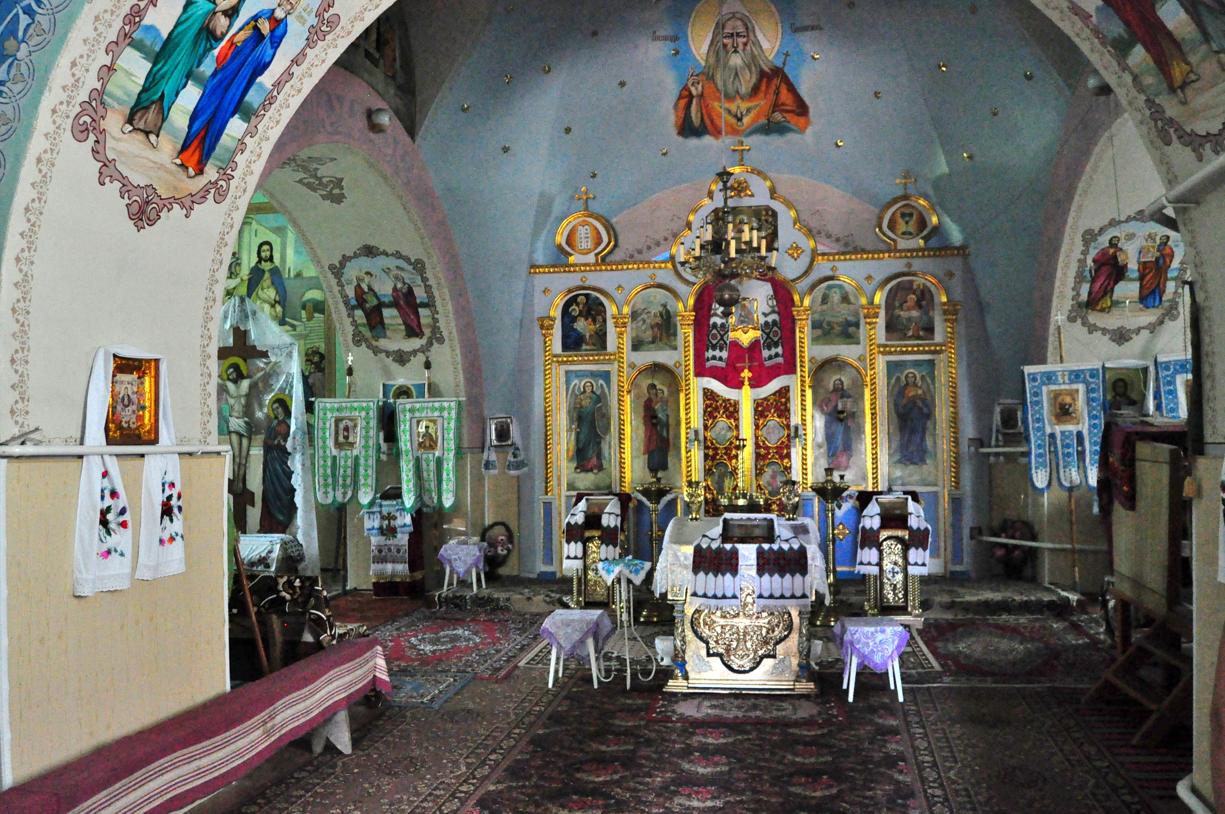 Інтер'єр Свято-Покровської церкви у с. Лисогірці Дунаєвецького р-ну Хмельницької обл.